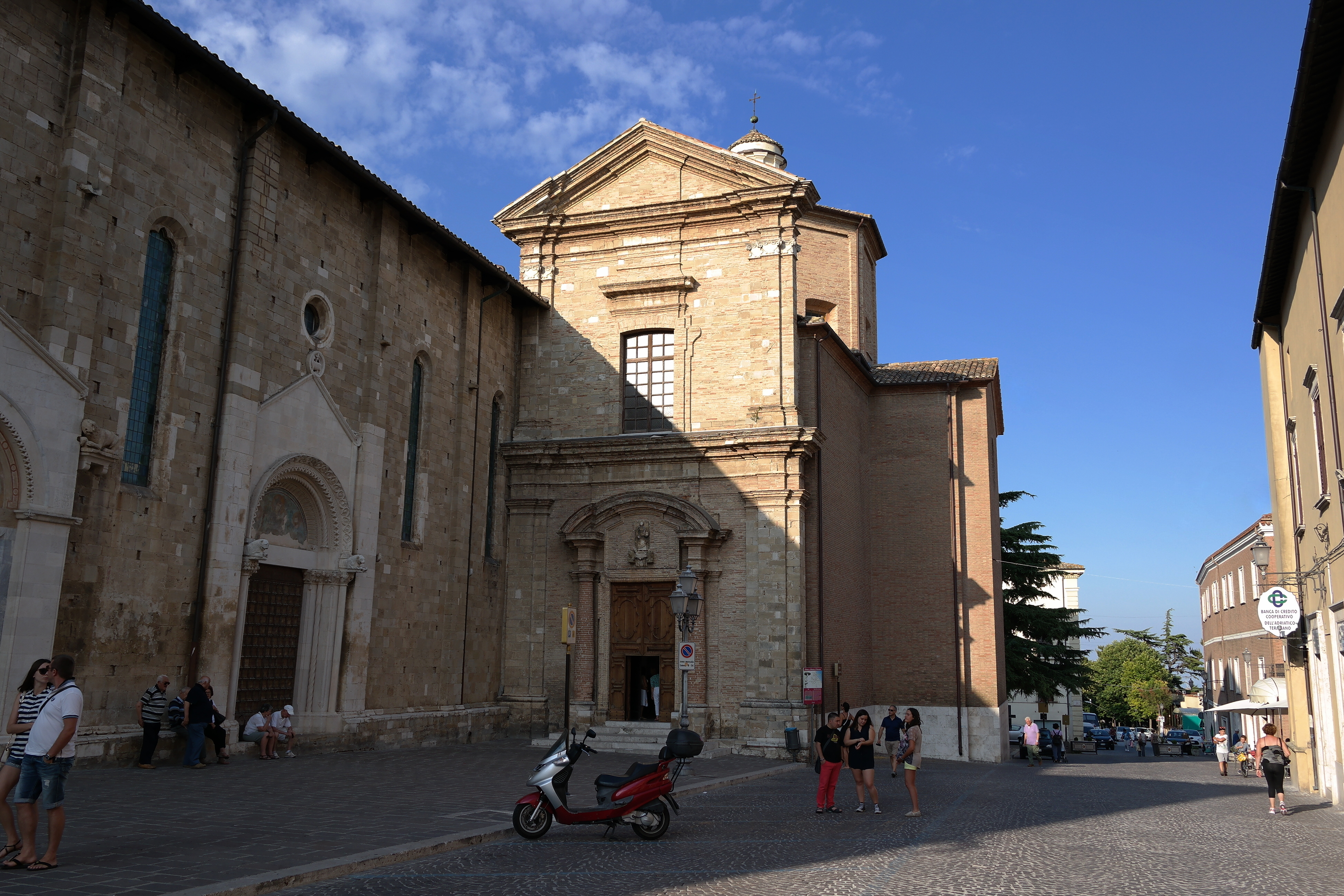 Chiesa di Santa Reparata ad Atri